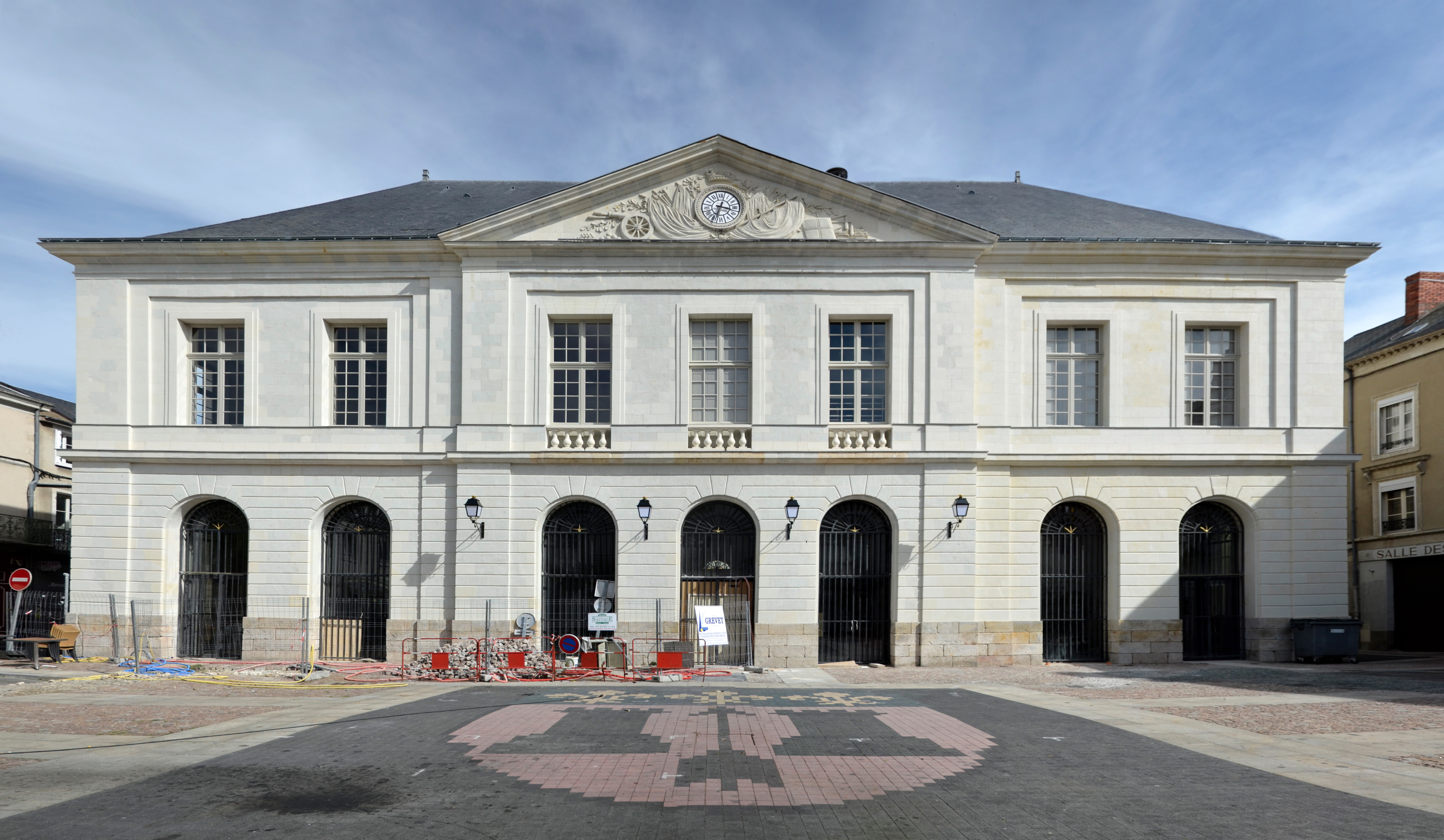 Halle de la Flèche (actuel théâtre) - La Flèche, Sarthe .